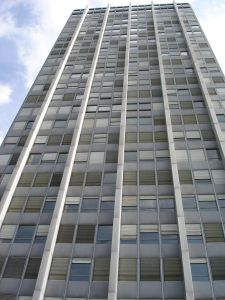 Sulzer-Hochhaus / Wintower